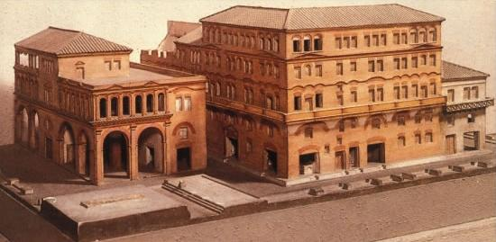 Реконструкција на инсула (староримска стамбена зграда) во Остија.